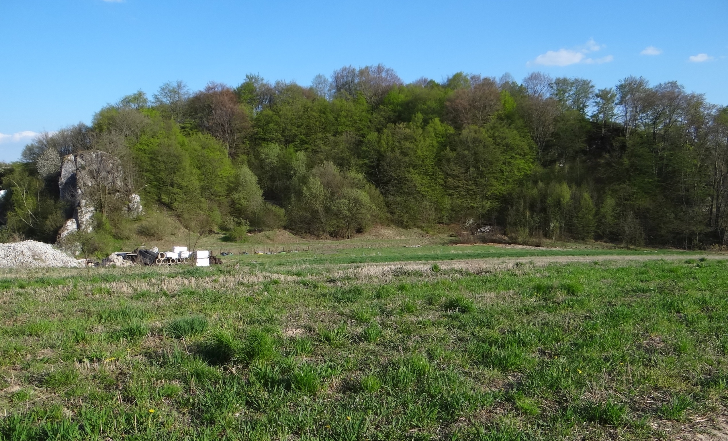 Rogożowa Skała w Przegini na Wyżynie Olkuskiej